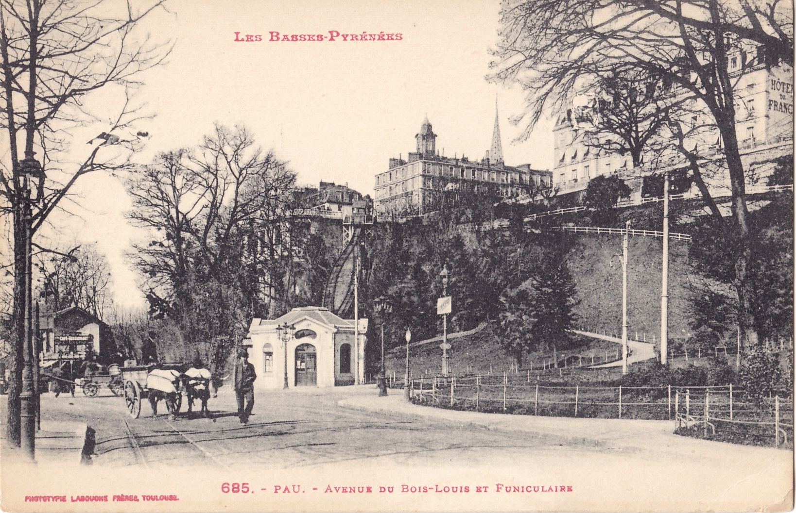 Carte postale ancienne éditée par Phototypie Labouche frères à Toulouse, n°685 : PAU - Avenue du Bois-Louis et Funiculaire